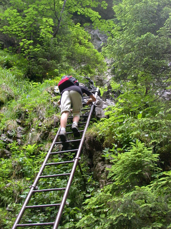 Drabinka w Wąwozie Kraków